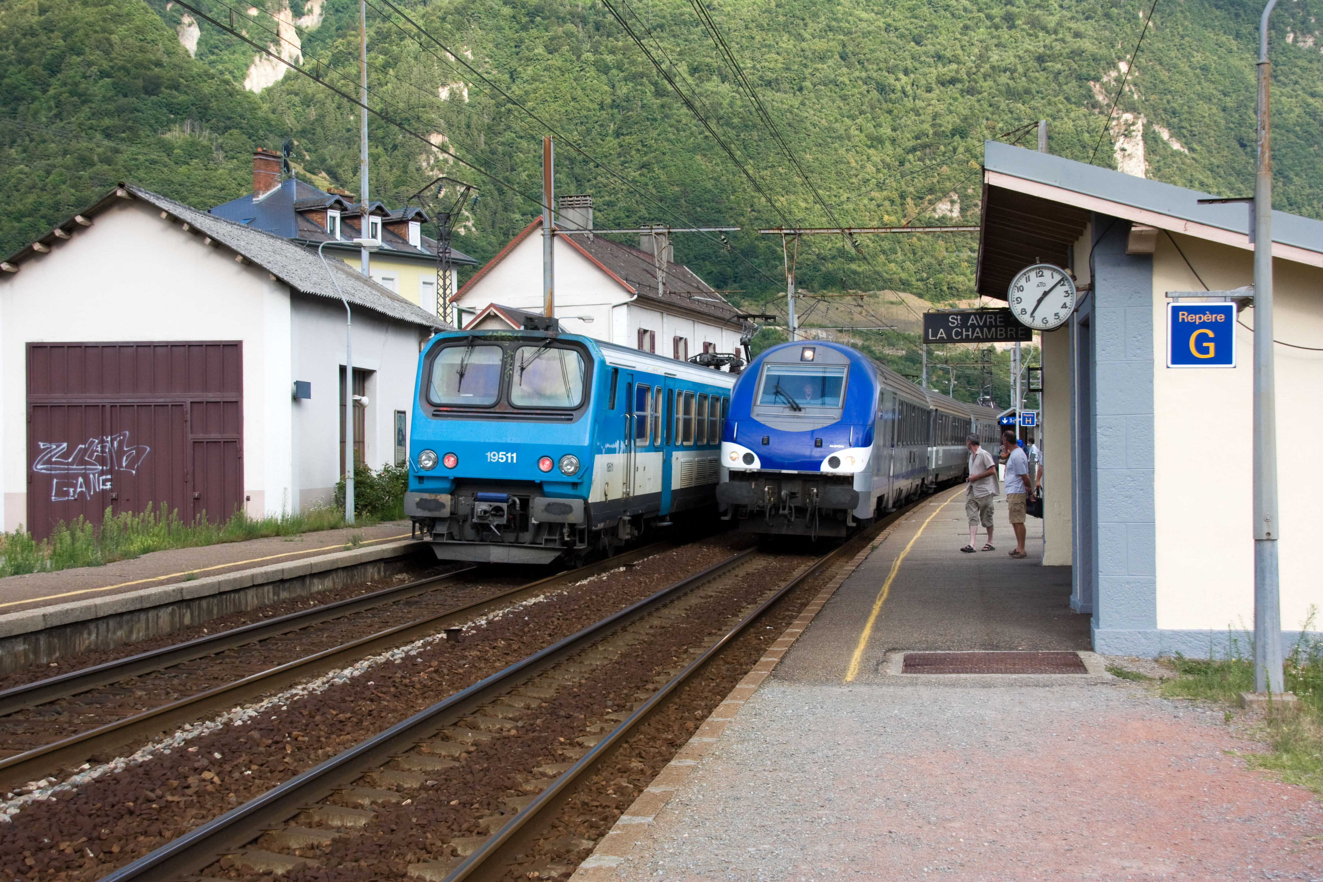 Saint-Avre, Savoie, France TER pour Lyon, TER pour Modane